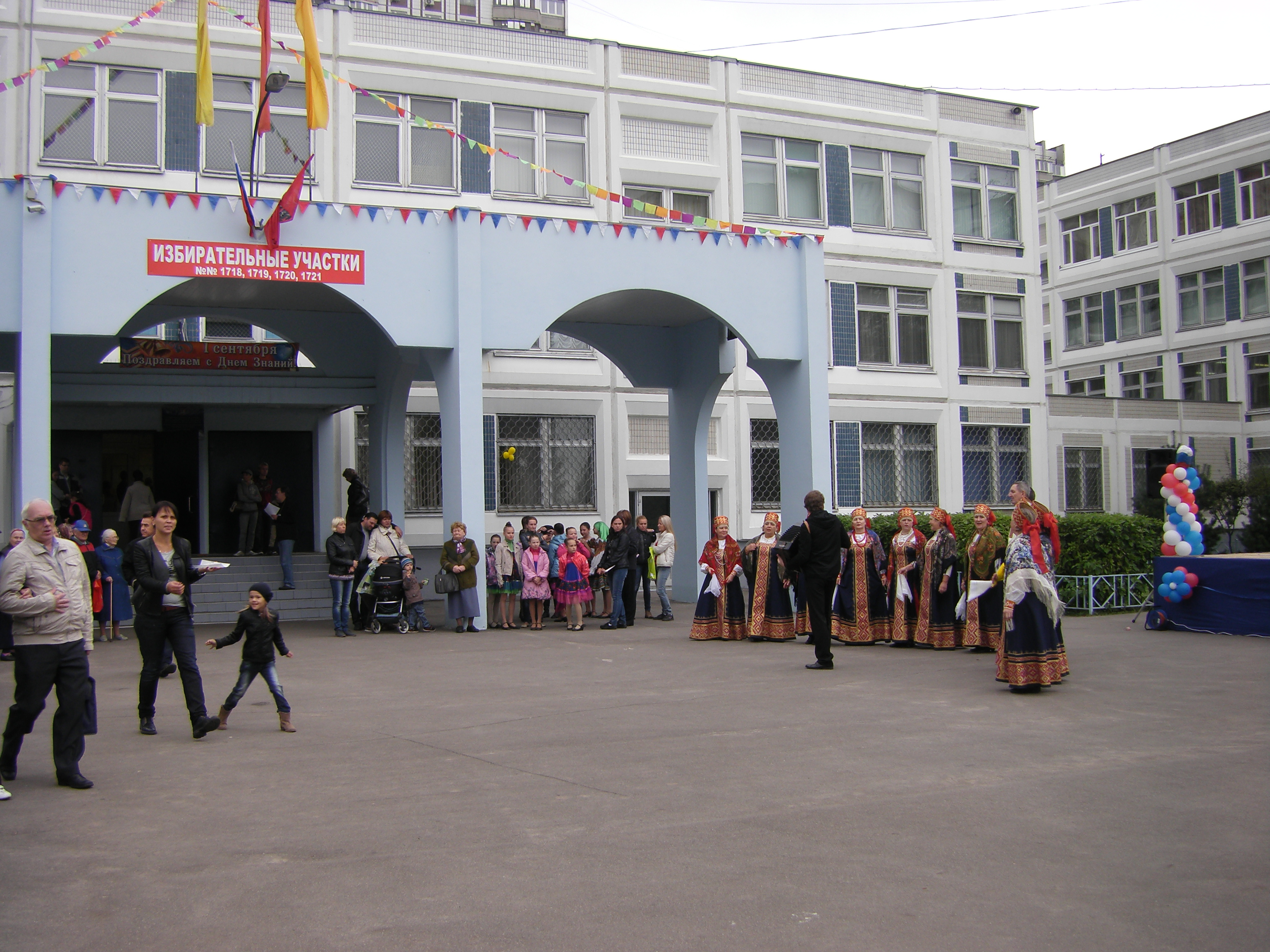 Здание школы № 1929, в которой находятся избирательные участки 1718-1721 для голосования по выбору мэра Москвы в 2013 году, и проводившееся рядом представление